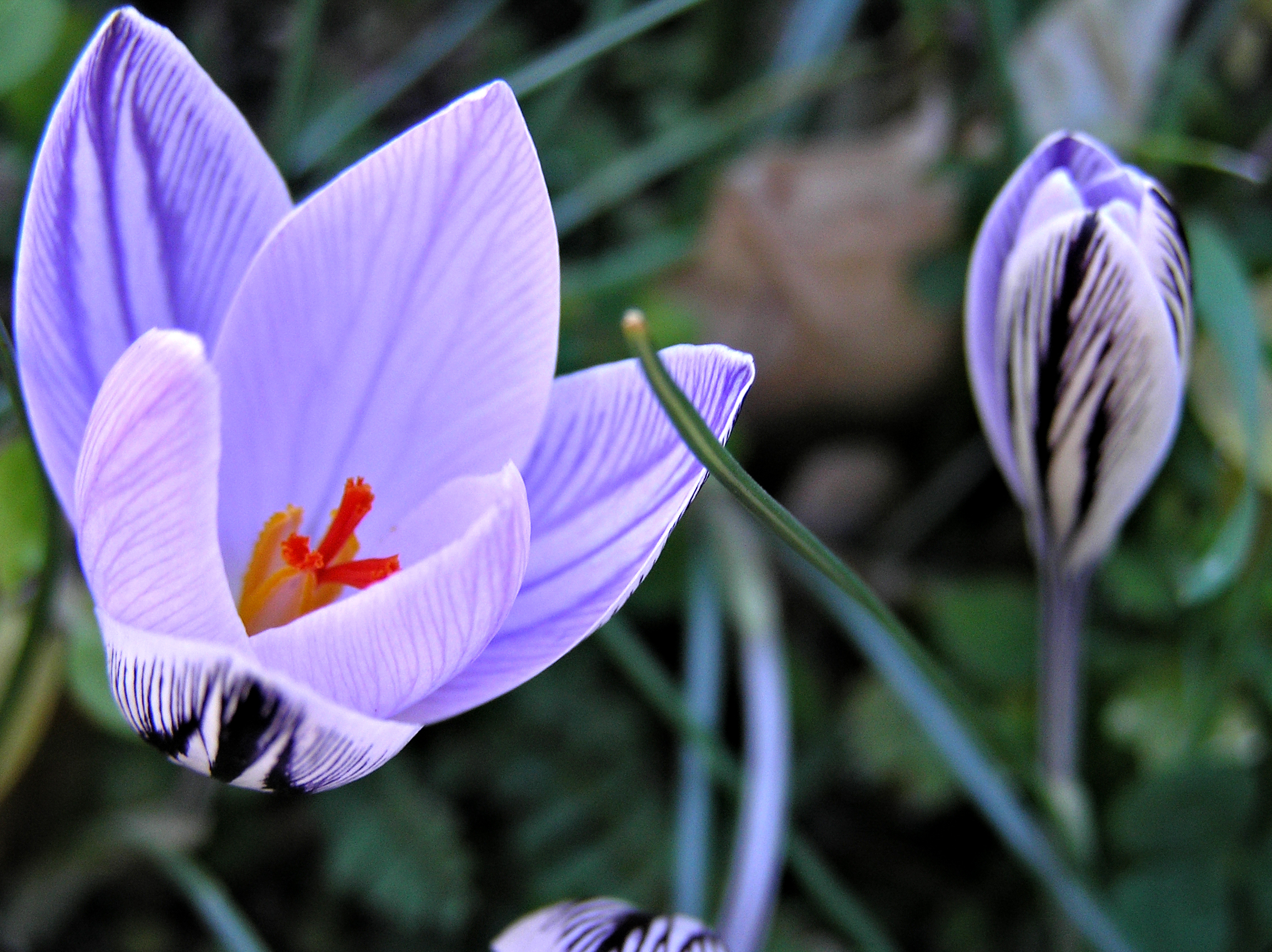 Lavatoggio (Corse) - Crocus corsicus février 2006